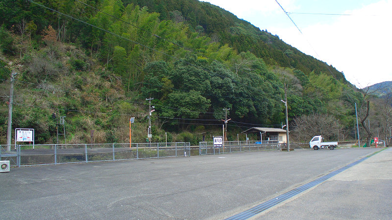 JR肥薩線瀬戸石駅 駅前広場からみたホームの様子 駅前広場にはかつて駅舎があった。 撮影者/著者/著作権保有者 : MK Products (本人がアップロード) 撮影日 : 2007/03/07 瀬戸石駅用にアップロードした画像です。良い画像があれば別の画像に変えてください。